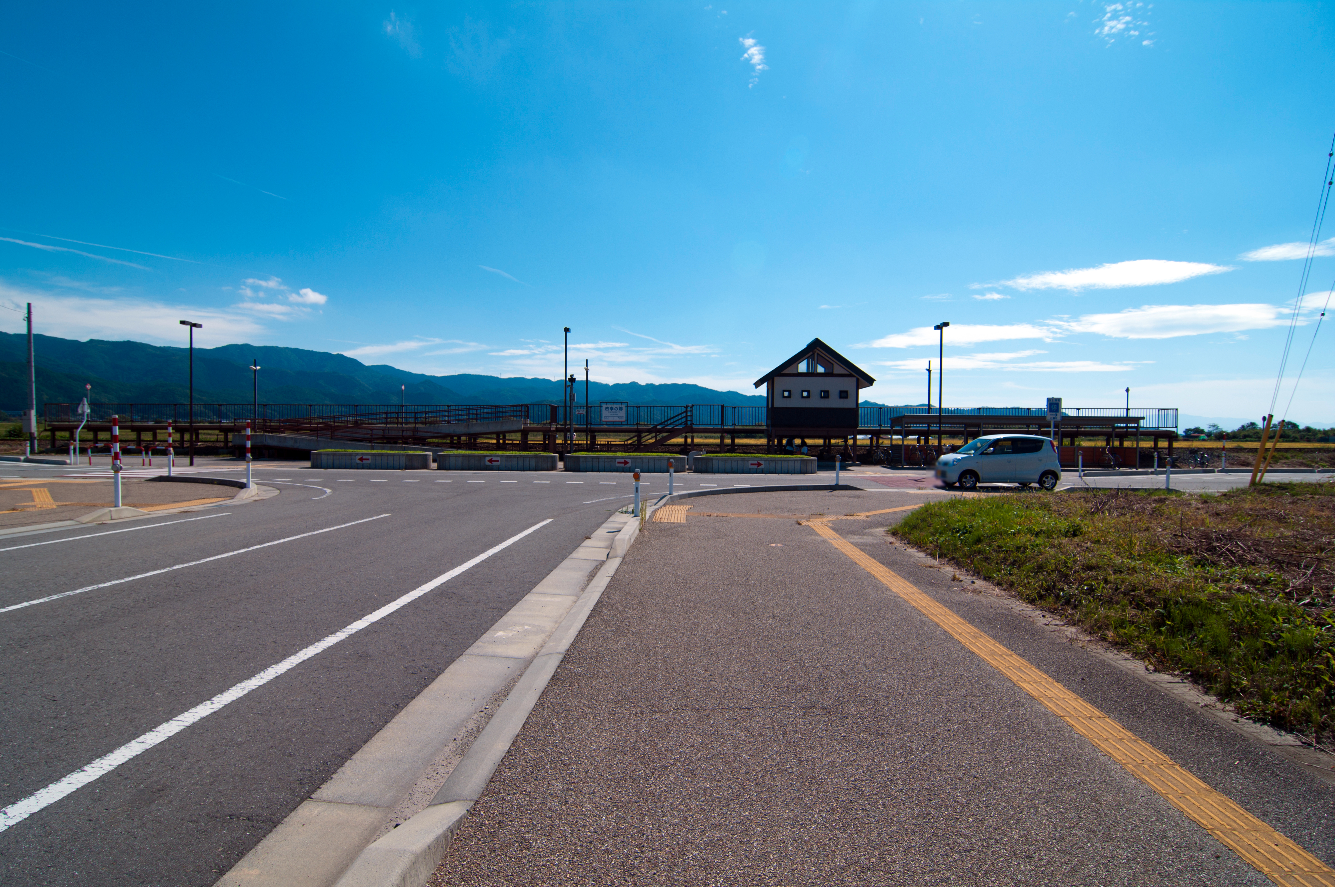 山形鉄道フラワー長井線四季の郷駅